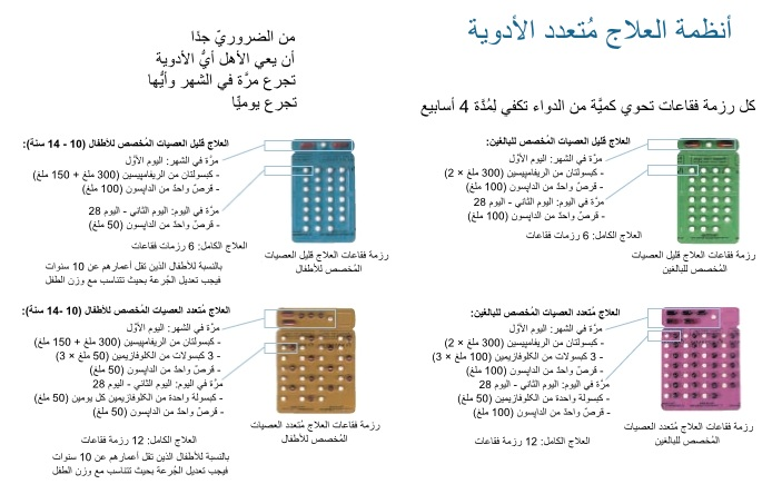 أنظمة علاج الجُذام مُتعددة الأدوية التي توصي بها مُنظمة الصحَّة العالميَّة.